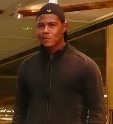 Ricardo Santos